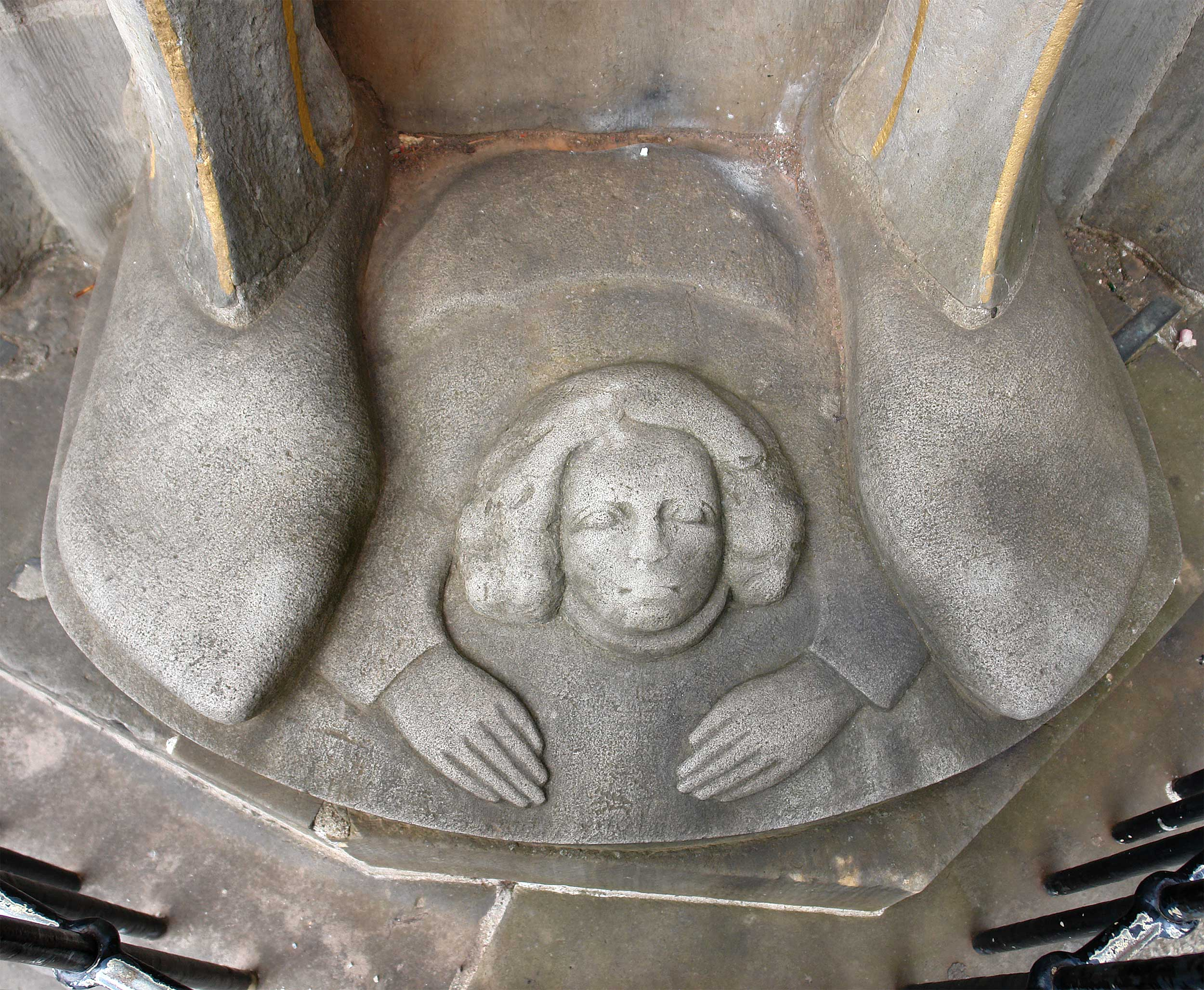 Detail: Der »Krüppel« zu Füßen des Roland auf dem Marktplatz in Bremen. Mit dem Bremer Rathaus Teil des Weltkulturerbe